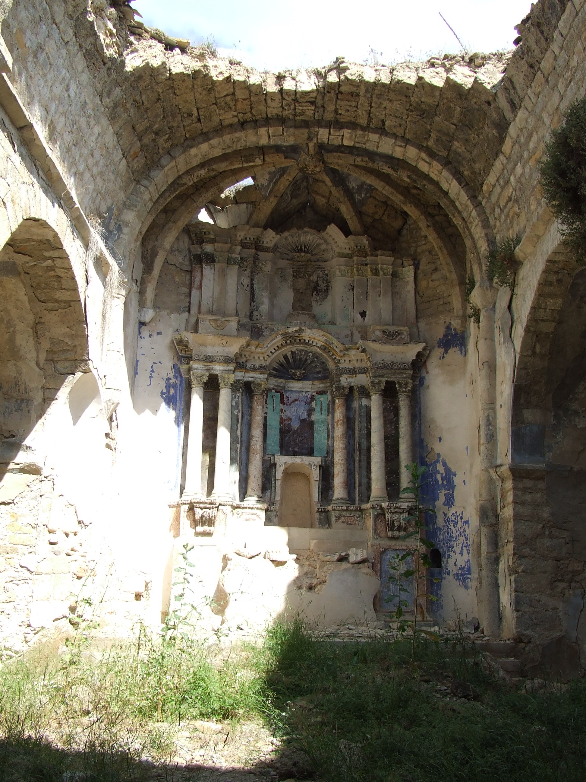 Interior de l'absis de Sant Fruitós d'Aramunt (Conca de Dalt, Pallars Jussà)